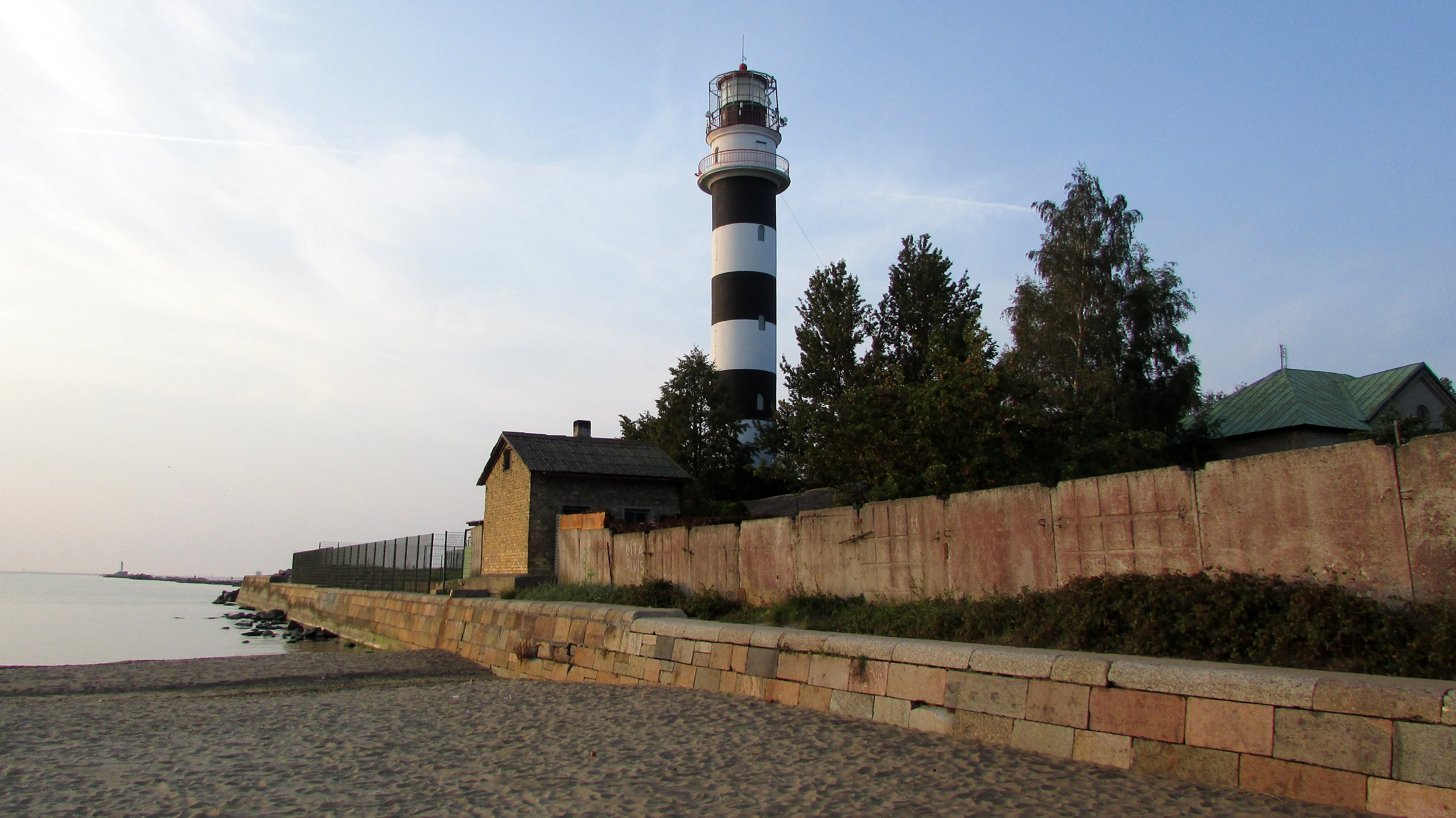 Komētforts, Rīga